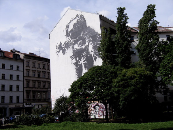 Der Block 104 bezeichnet einen Altbau-Komplex in Berlin-Kreuzberg. Er wurde bis 1981 zur Hälfte zerstört, der Rest blieb durch die Hausbesetzer-Bewegung erhalten. Die Abrissfläche ist heute Park (Nähe U-Görlitzer Bahnhof). Markant ist das Porträt des Astronauten Armstrong auf einer Wandfläche.